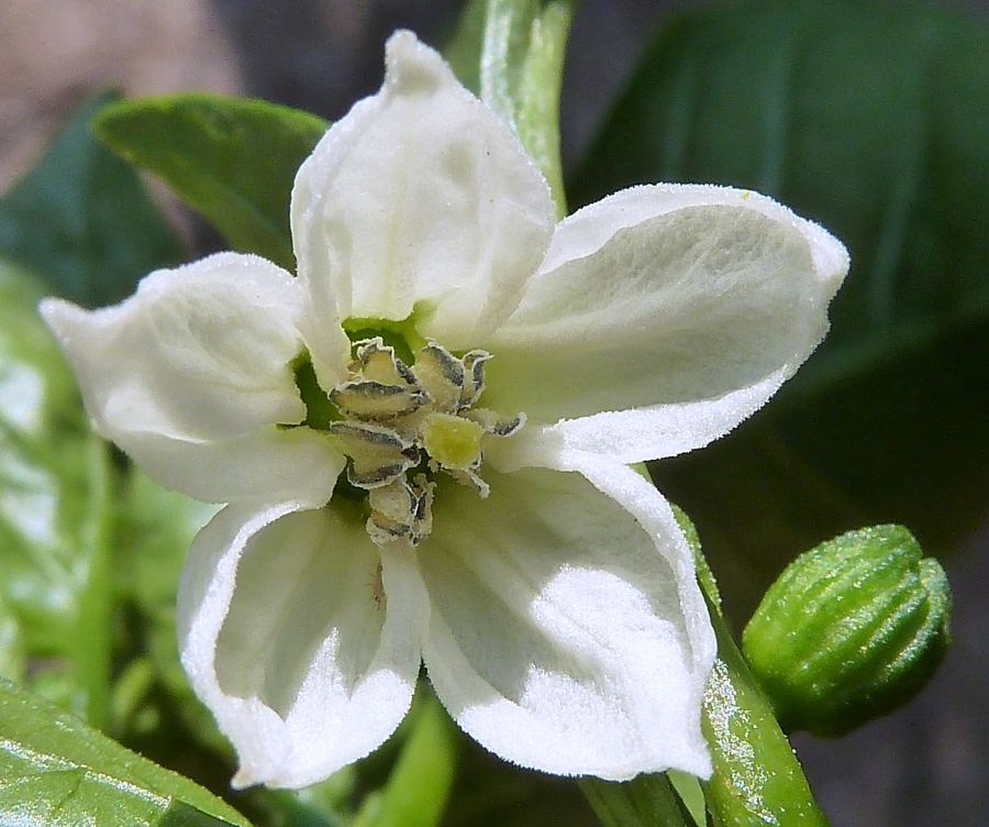 Capsicum annuum cv. Italiano): Flor, detalle - La Huerta/El Canalillo, Albatera (Alicante, España).